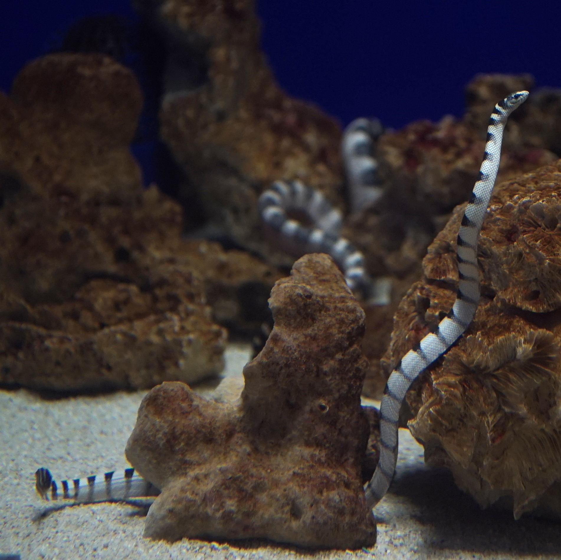 クロボシウミヘビ Ornate reef sea snake Domain: Eukaryota • Regnum: Animalia • Phylum: Chordata • Subphylum: Vertebrata • Infraphylum: Gnathostomata • Superclassis: Tetrapoda • Classis: Reptilia • Ordo: Squamata • Familia: Elapidae • Genus: Hydrophis Wikispecies has an entry on: Hydrophis ornatus. Species Hydrophis ornatus (Gray, 1842) 動物界 脊索動物門 爬虫綱 有鱗目 コブラ科 ウミヘビ属 Location: Suma Aqualife Park, Kobe, Japan Other photos: NCBI Taxonomy ID:8685 ITIS link: Hydrophis ornatus (Gray, 1842) EOL link: Hydrophis ornatus uBio search link: Hydrophis ornatus